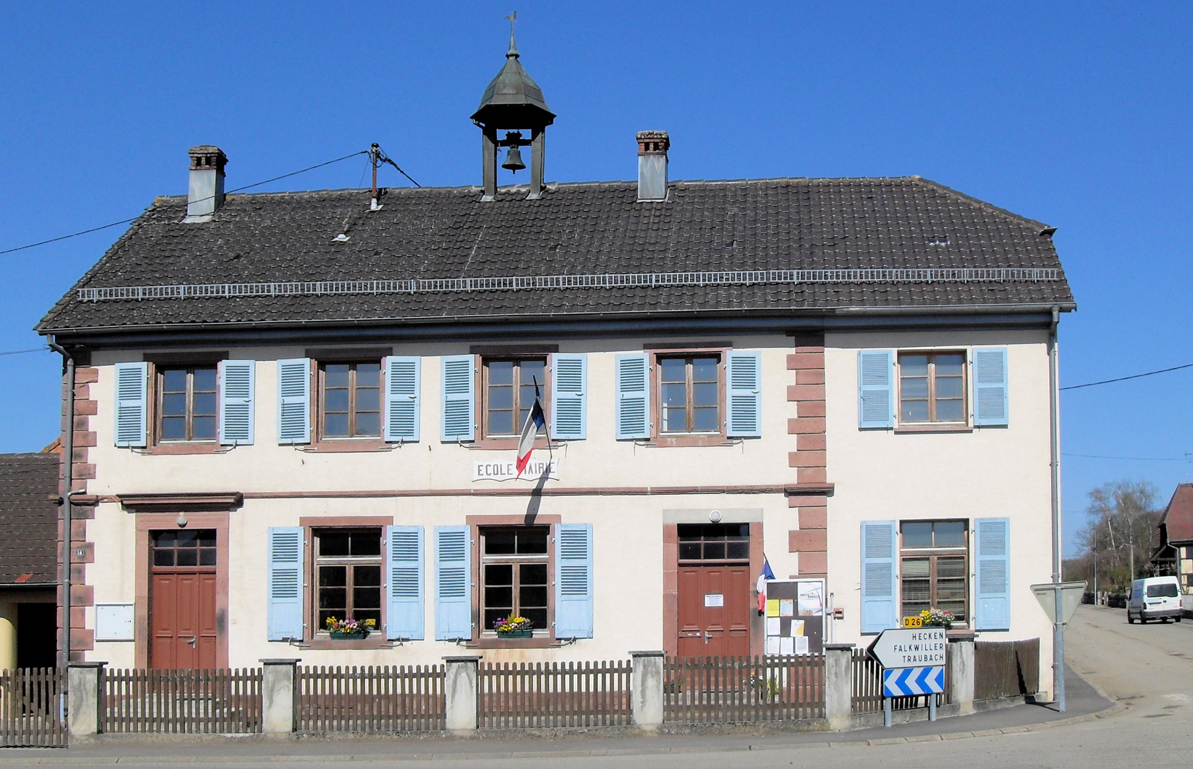 La mairie-école de Gildwiller